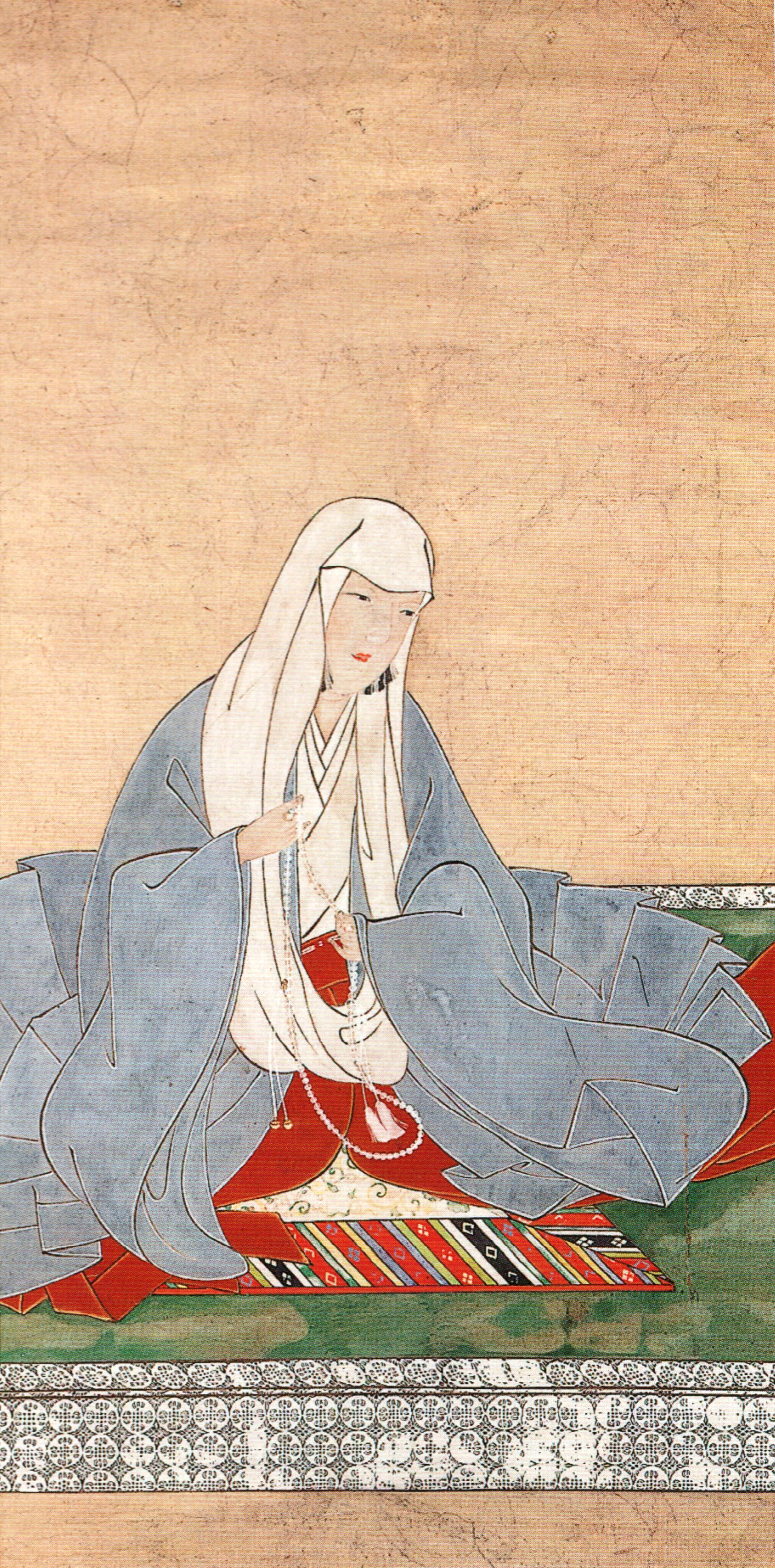 待賢門院（藤原璋子）。鳥羽天皇の中宮。